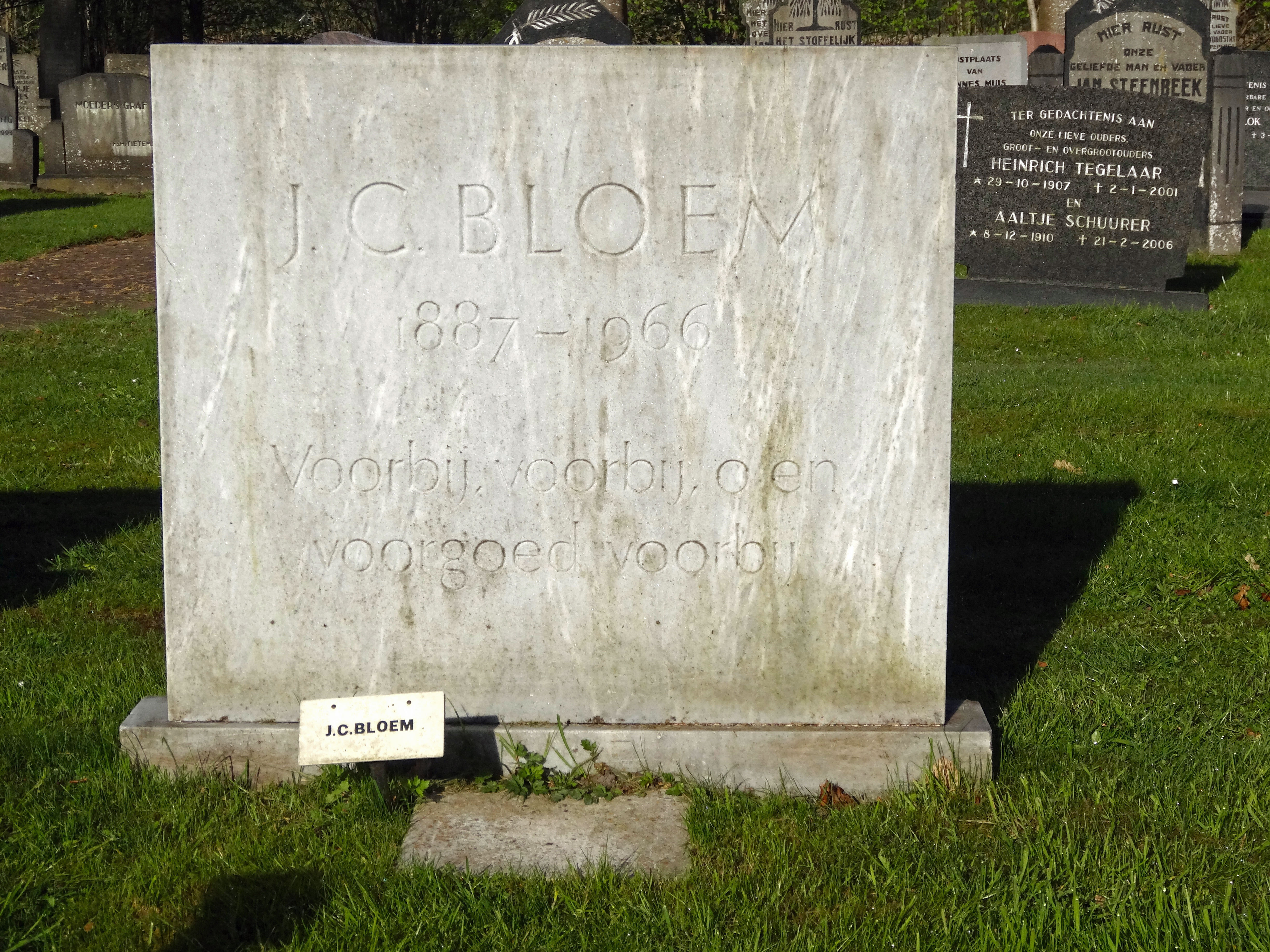 Grafzerk van J.C. Bloem op het kerkhof nabij de kerk van Paasloo